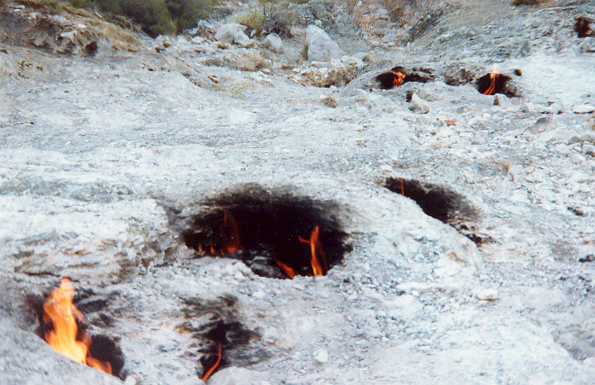 Chimaira - Flammen aus Erdspalten